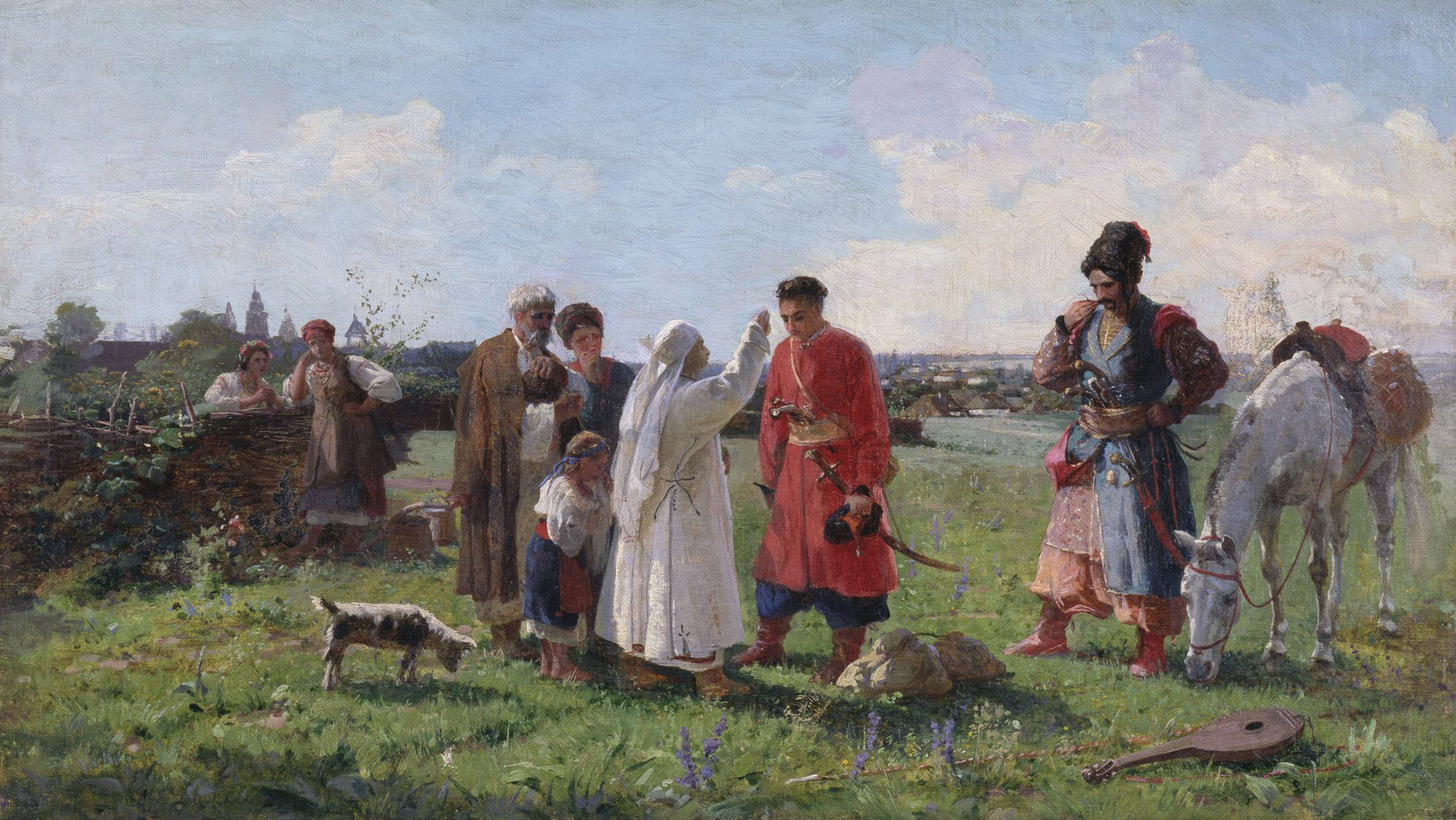 Проводи на Січ: Холст, масло.